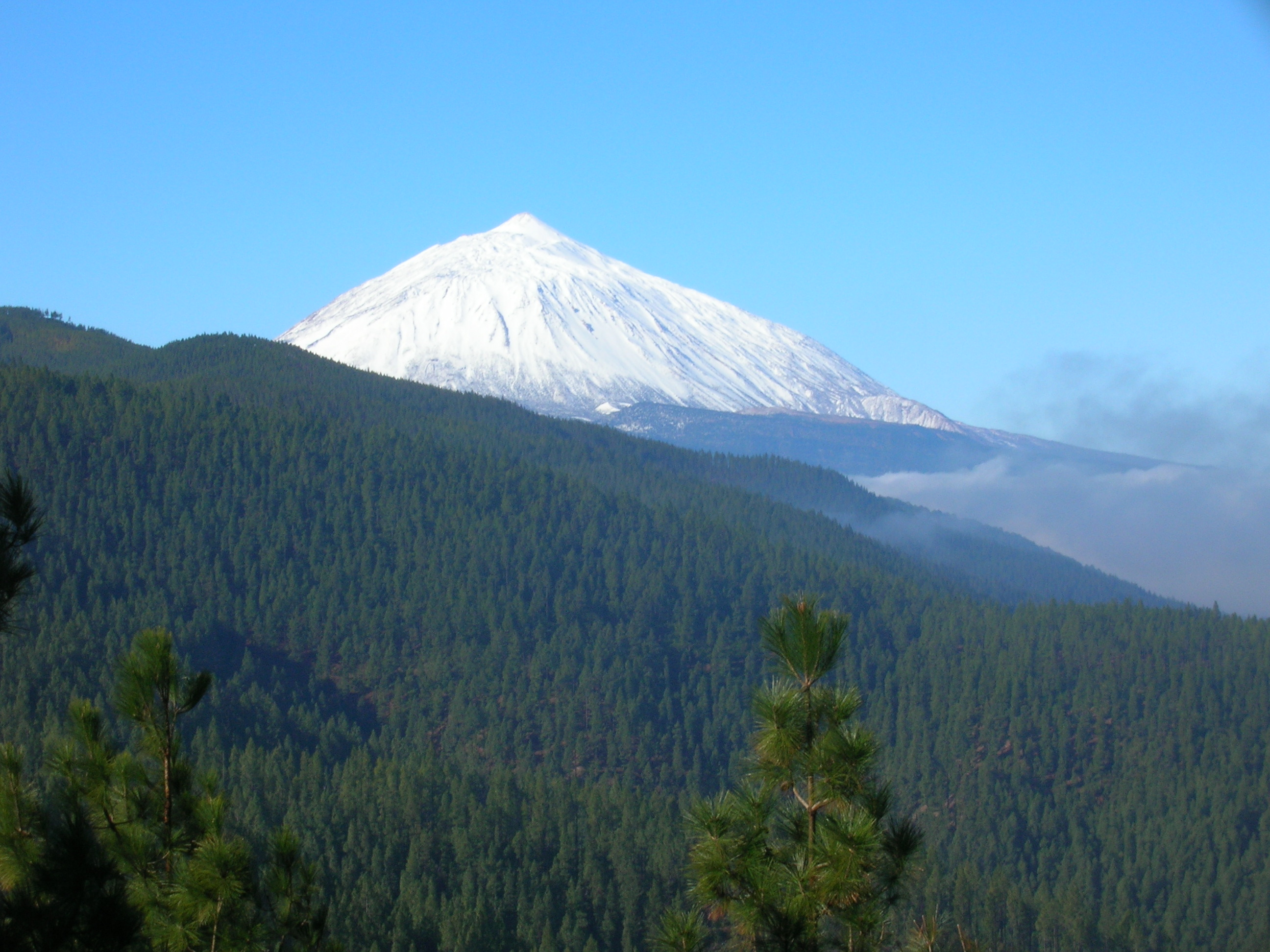 Pinar y Teide nevado